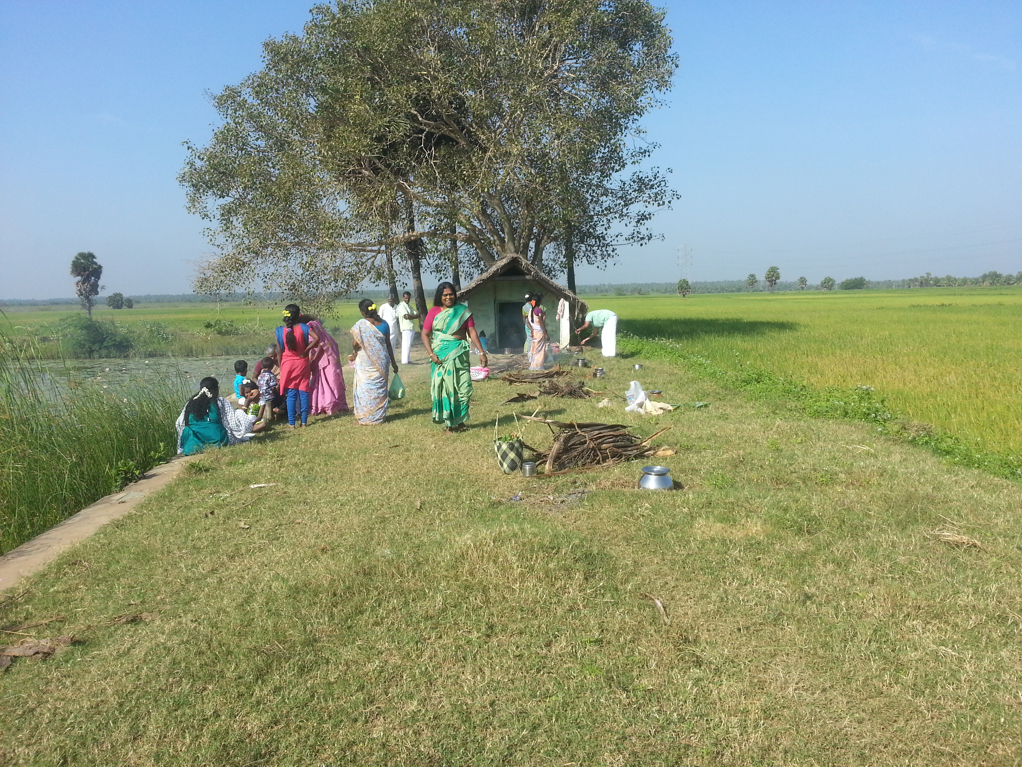 முடச்சிக்காடு விநாயகர் ஆலயம்